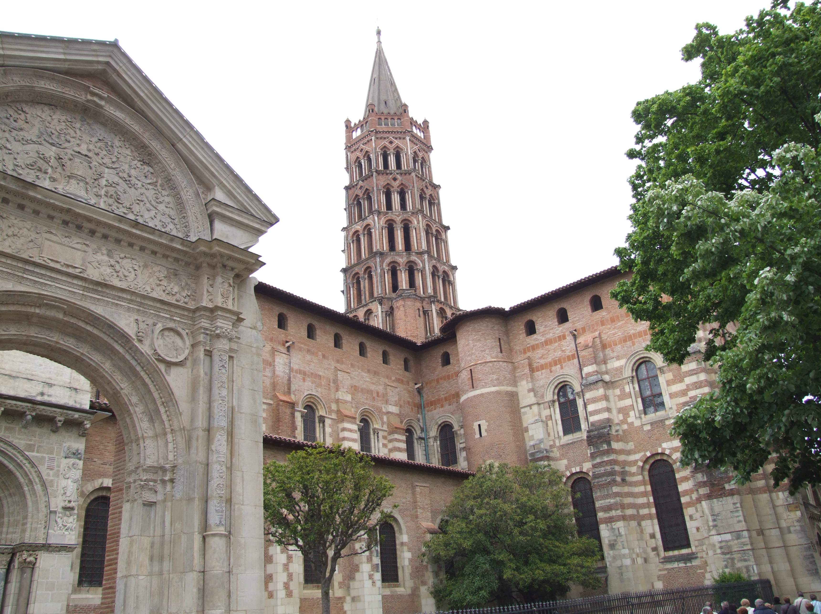 Toulouse - Basilika St. Sernin